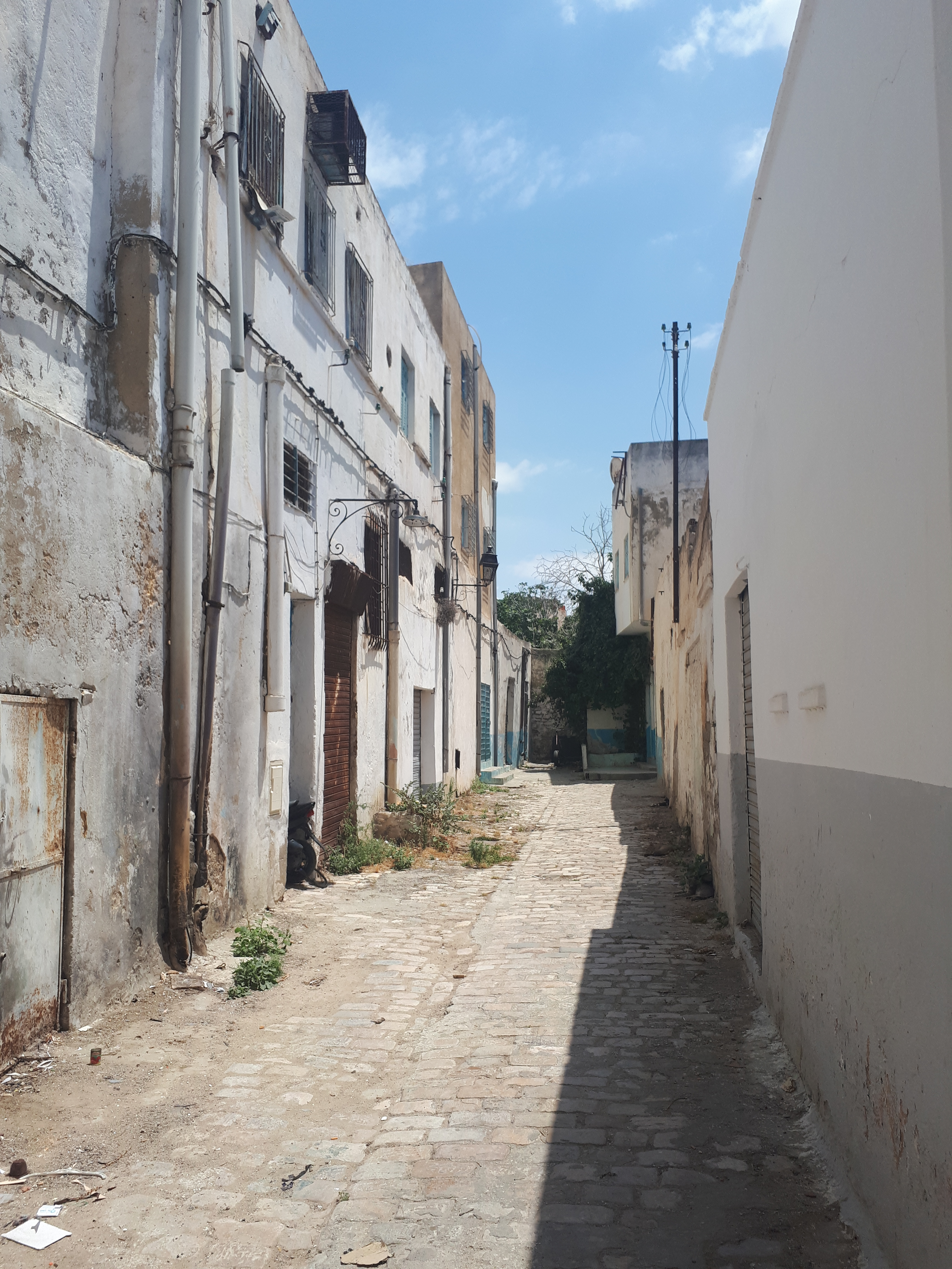 Impasse el Hannachi, Tunis